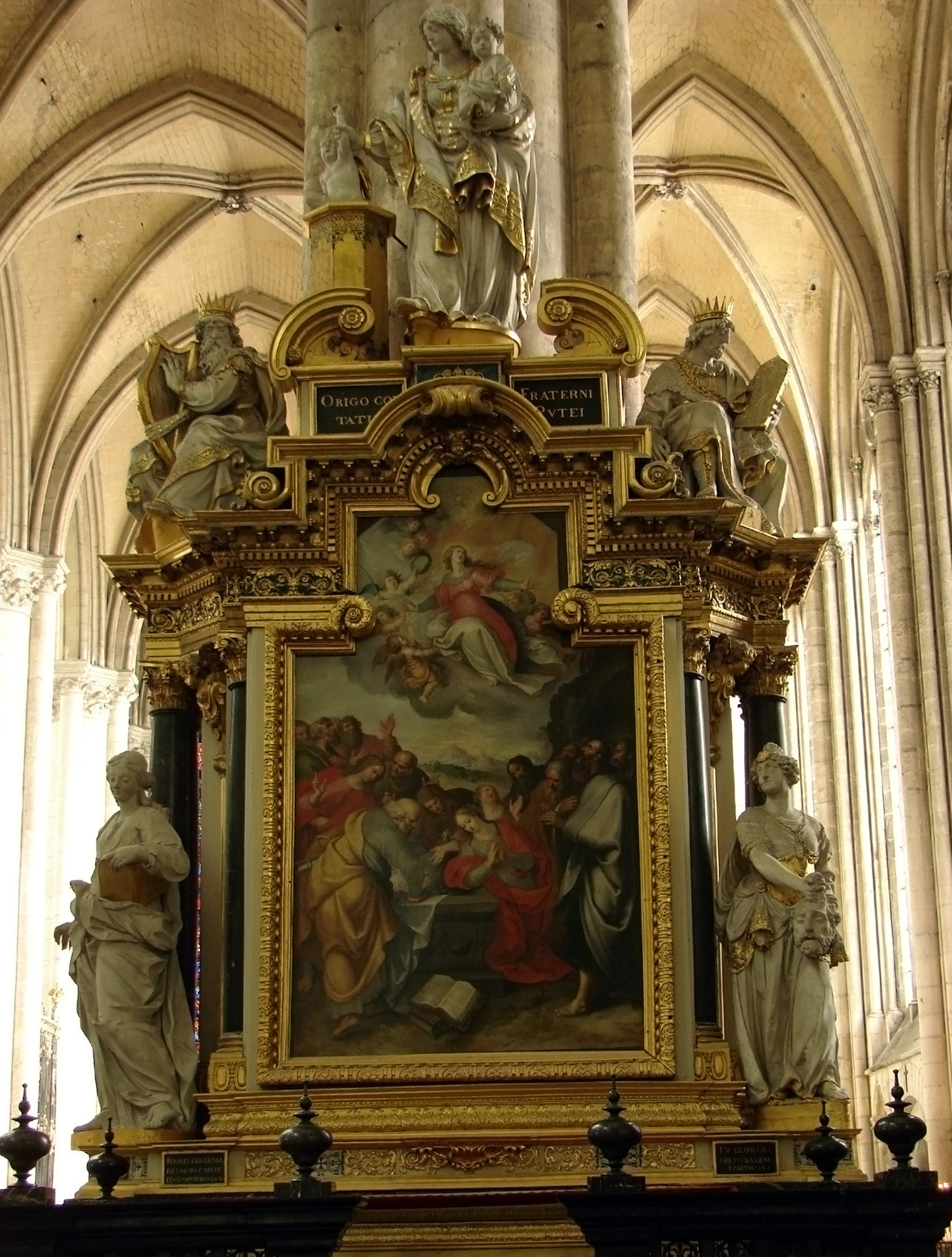 Chapelle de Notre-Dame du Pilier Rouge ou de Notre-Dame de Puy; oeuvre de Nicolas Blasset, offerte en 1627 par Antoine Pingre, maître de la Confrérie du Puy. En haut: la Vierge tirant un enfant d'un puits, entre David et Salomon. En bas, de gauche à droite: Sainte Geneviève, par Cressent (qui remplace l'Esther de N. Blasset, détruite à la Révolution), l'Assomption de la Vierge par François Francken le Jeune (1628), Judith tenant la tête d'Holopherne. Cathédrale Notre-Dame d'Amiens.